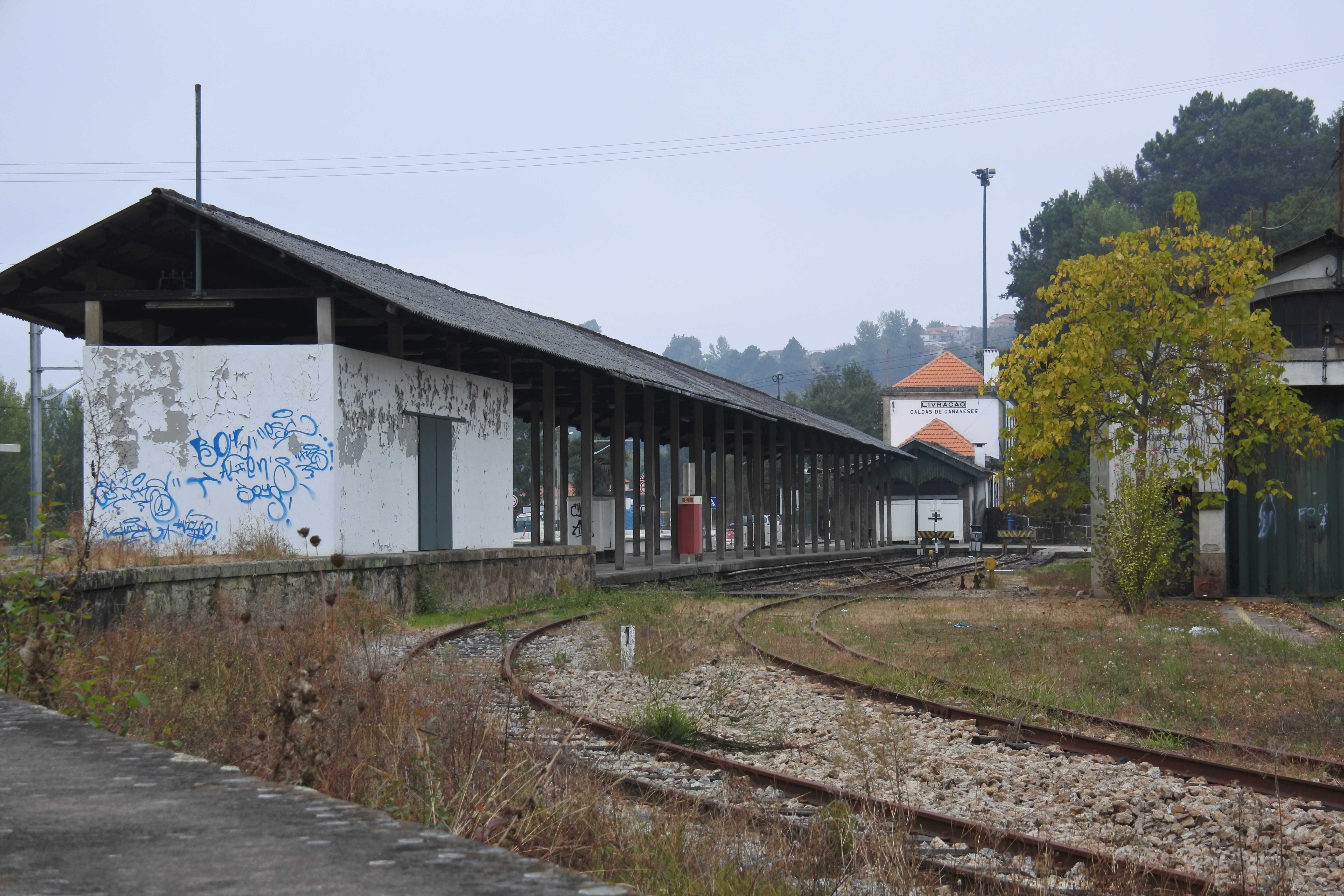 BragaAveiro - 244